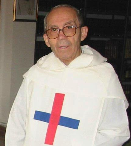 Ministro general de la Orden de la Santísima Trinidad.